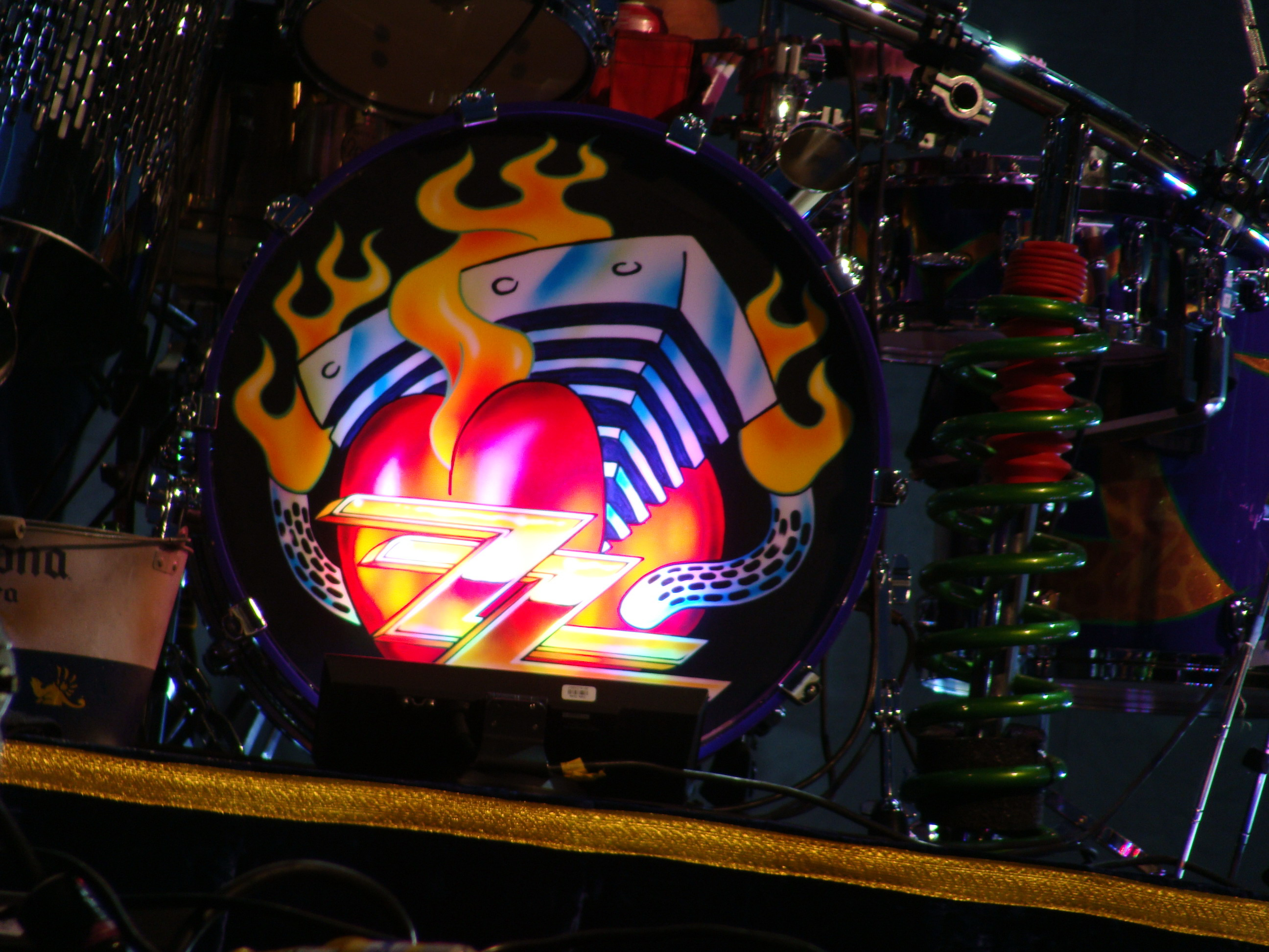 Vista de la batería de Frank Beard, en un concierto de ZZ Top en el Bilbao BBK Live 2008.